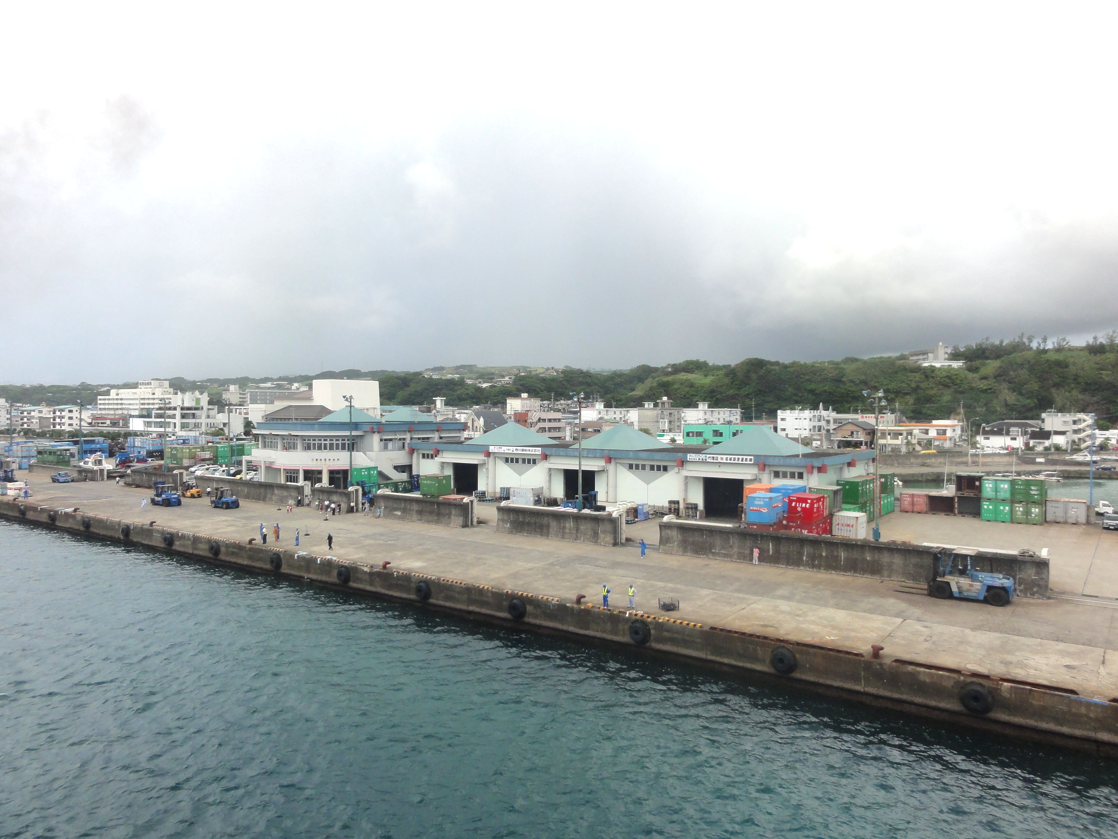 亀徳新港